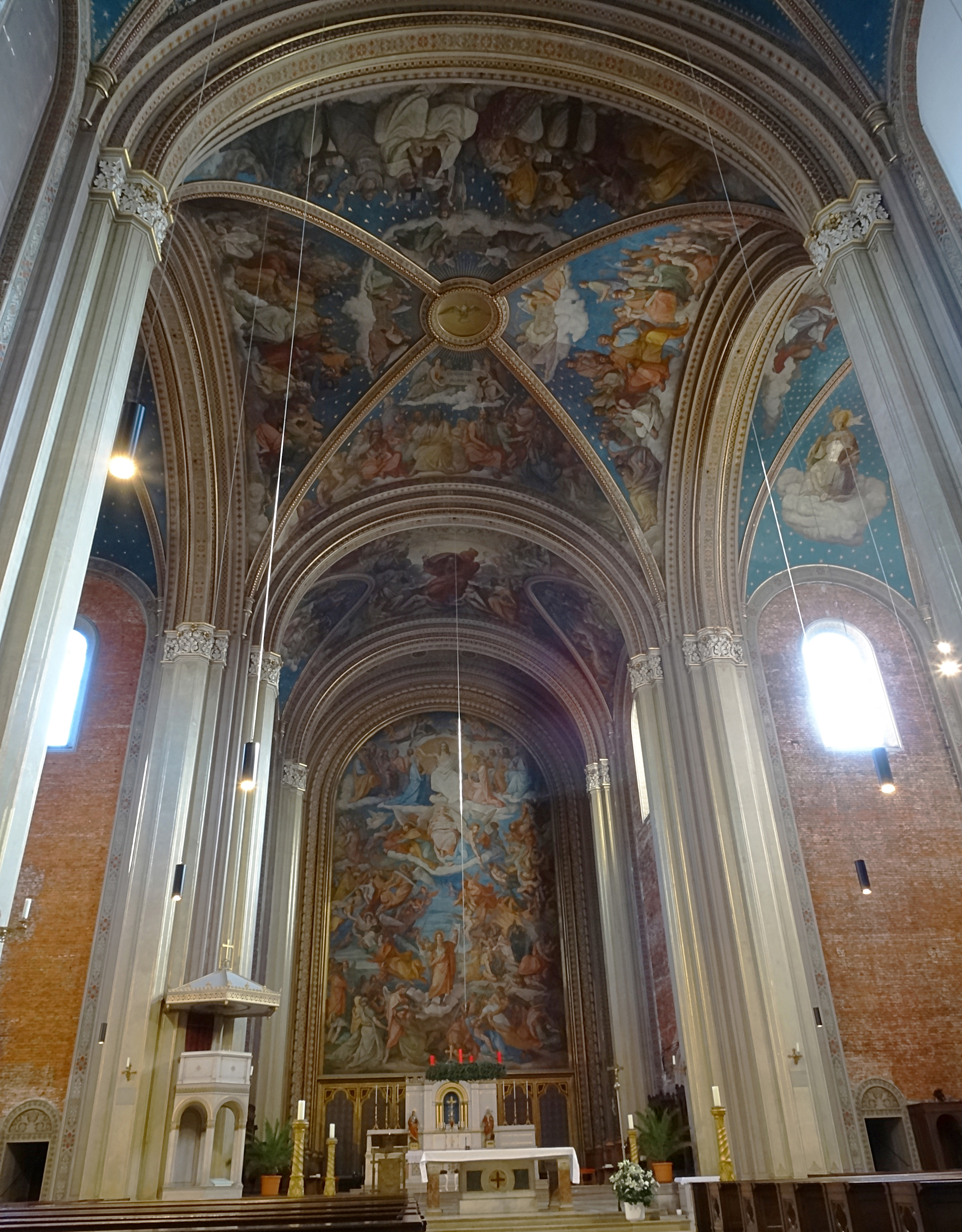 Chor der Ludwigskirche mit dem zweitgrößten Altarfresko der Welt